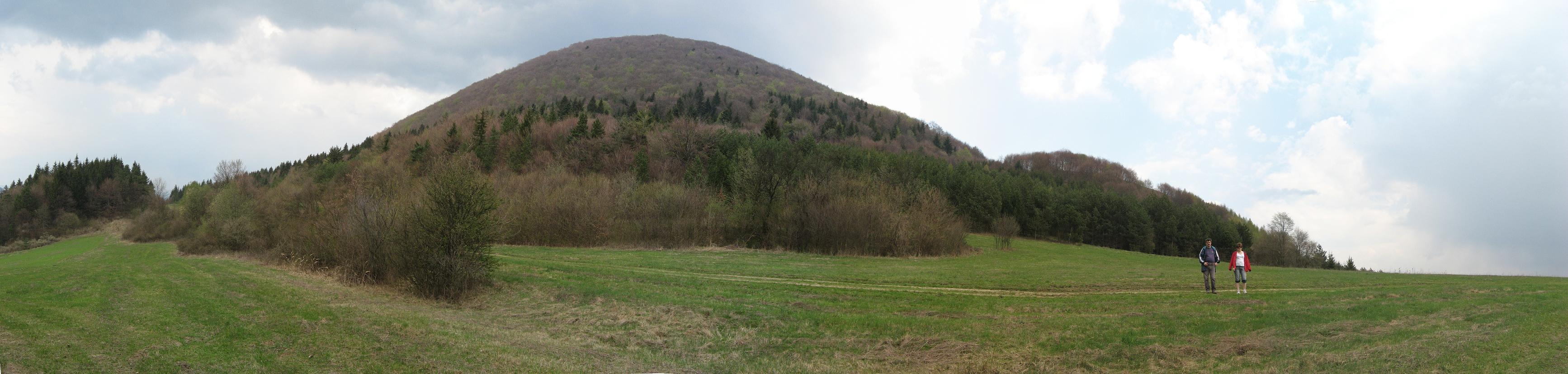 Veľký Manín je najvyšší vrch Súľovských skál, vysoký 891 m. Leží na severovýchod od mesta Považská Bystrica. Severný svah vrchu sa prudko zráža do Manínskej tiesňavy. Nad druhej strane tiesňavy sa rozkladá nižší, geologicky a morfologicky príbuzný Malý Manín.